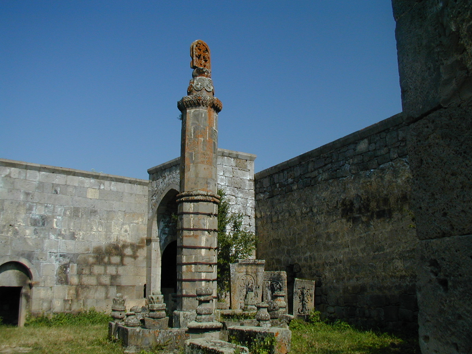 Tatev məbədində qədim alban xaçdaşları.